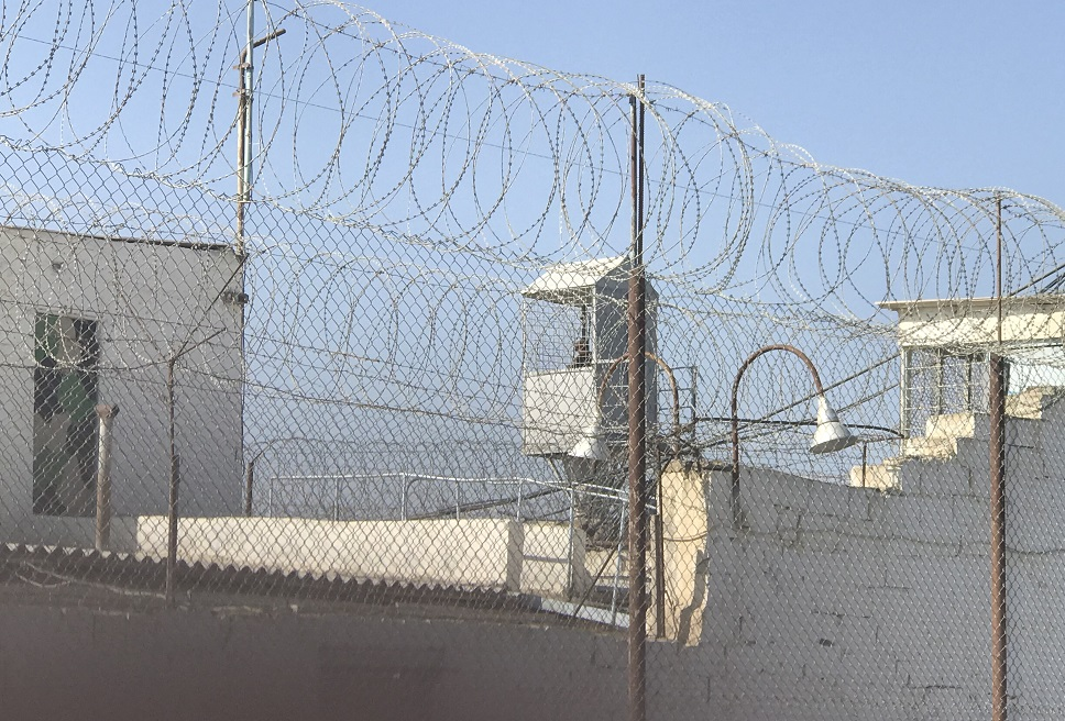 14 saylı Cəzaçəkmə Müəssisəsi 2018-ci ildə